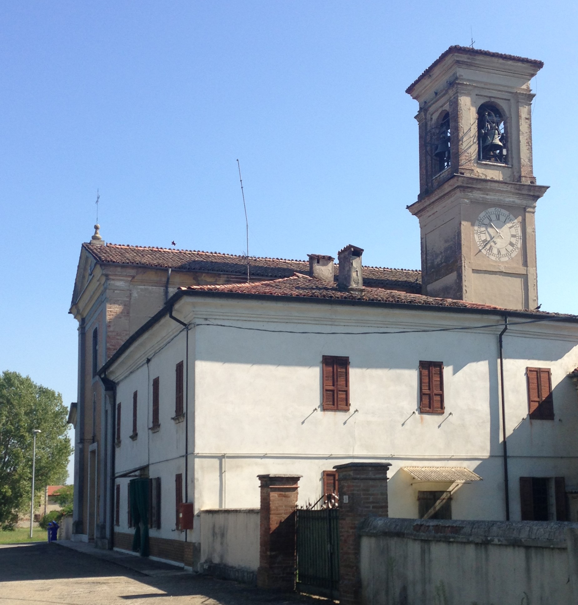 Iglesia rural entre Fiorenzuola d'Arda y Fidenza